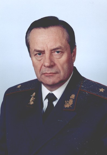 Цибуленко Микола Васильович (Mykola V. Tsybulenko)